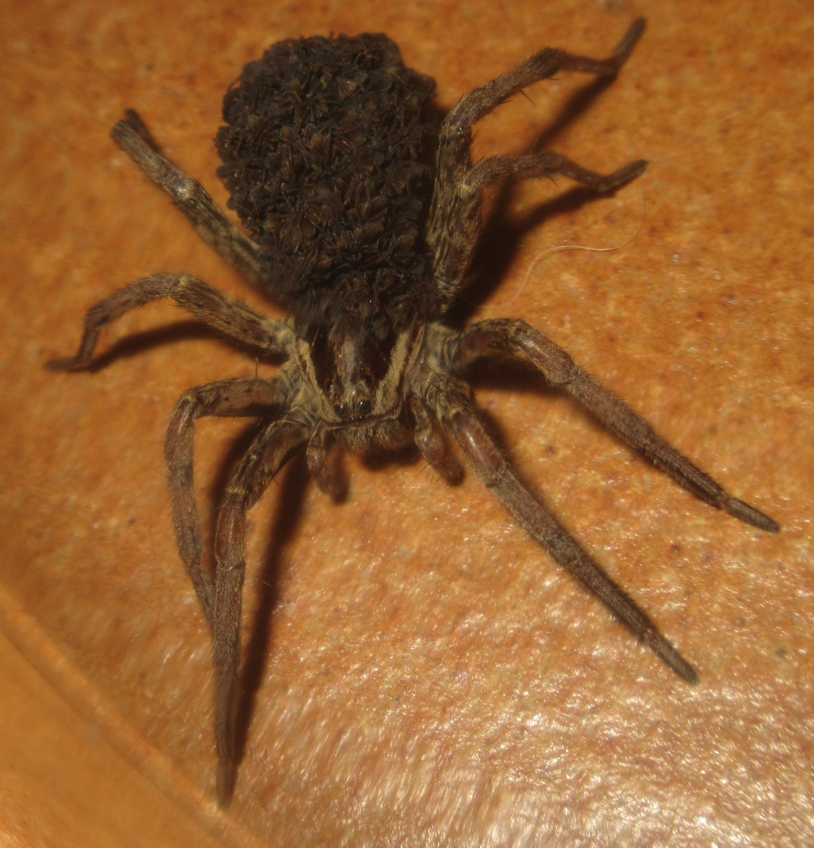 La progéniture est nombreuse, très dense et entremêlée, difficile d'y isoler un individu complet. Mais on y distingue des abdomens dans une forêt de pattes. Araignée fuyant vers l'ombre dès qu'on en approche l'appareil photo. Araignée confinée sous cloche de verre pour cette photo, prise en mode macro.